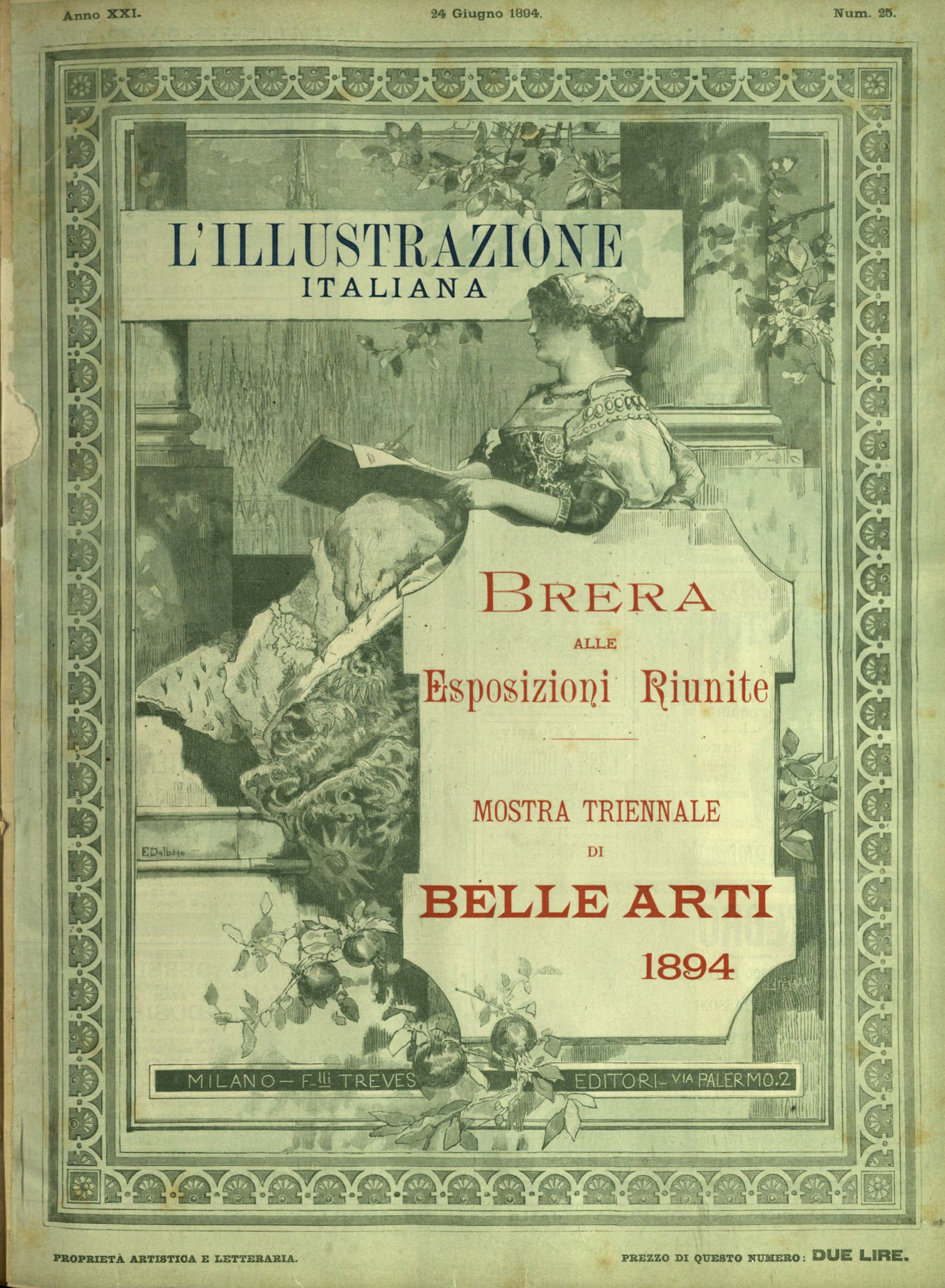 L'Illustrazione Italiana, pagina interna del num. 25, anno XXI, 1894; Mostra Triennale di Belle Arti 1894